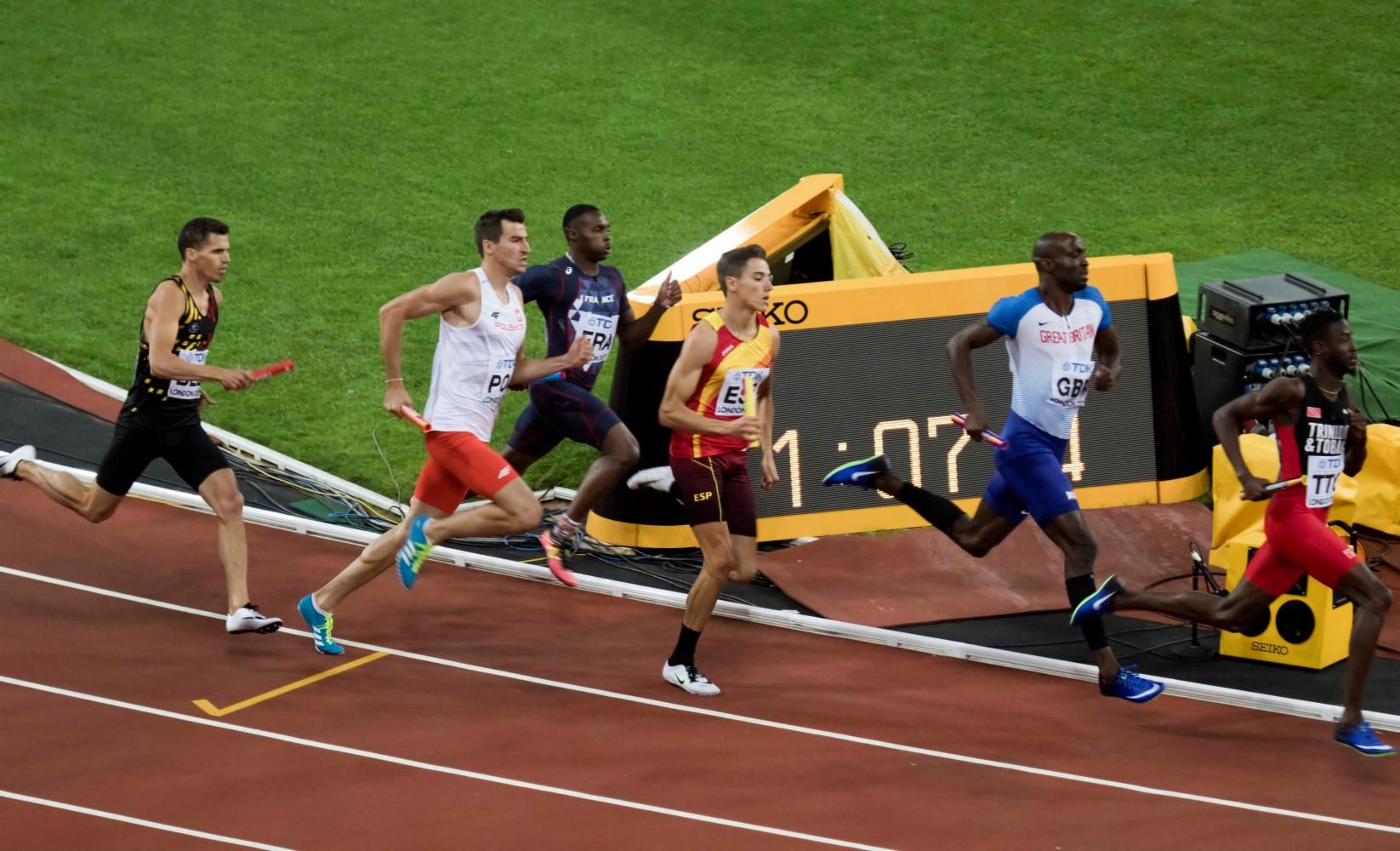 d9_16 finale 4x400m team belgium